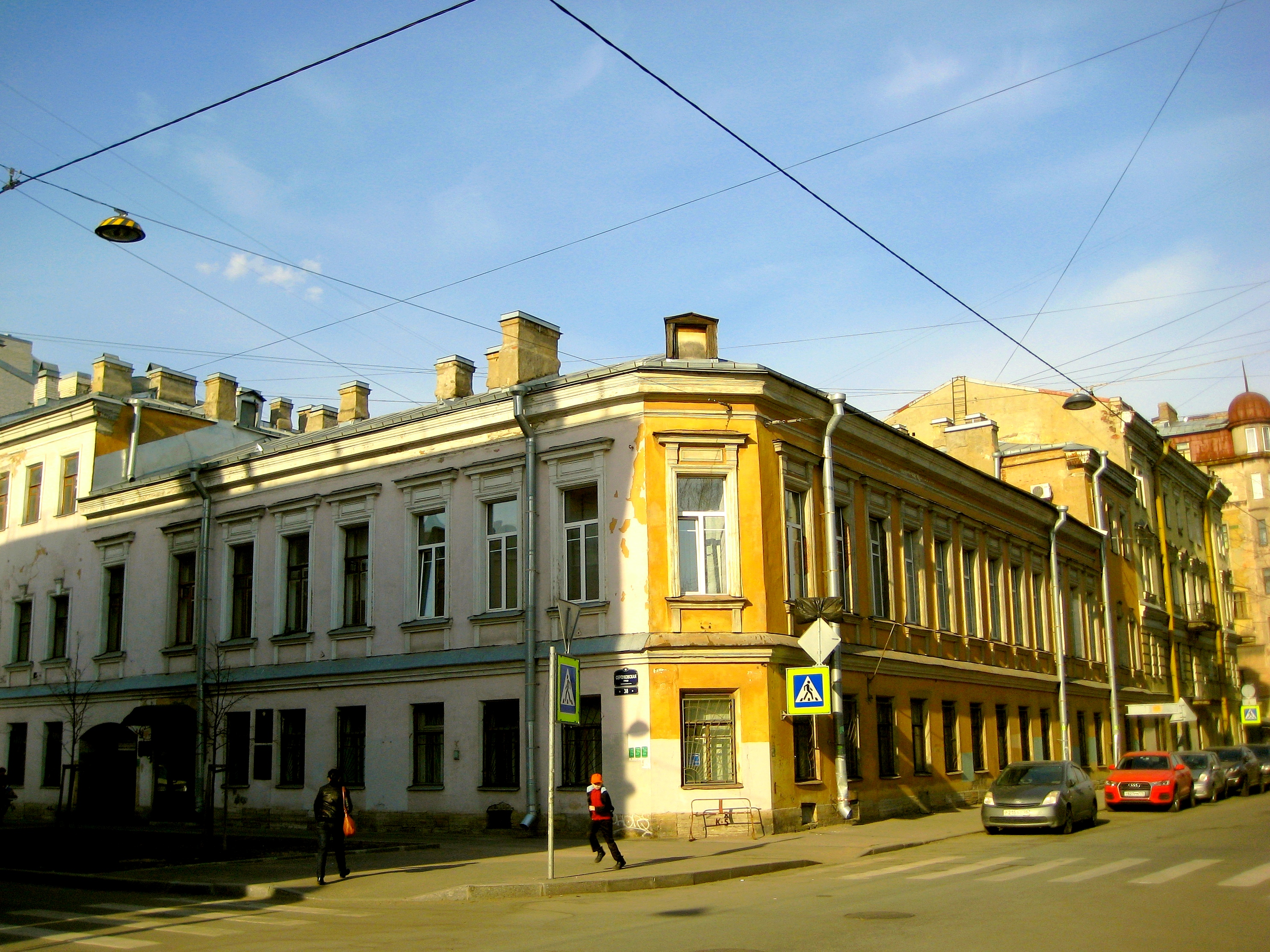 Санкт-Петербург. Серпуховская улица, 38 / Малодетскосельский проспект, 15. Особняк А.Н.Виноградова. Архитектор - Пруссак В.Ф.